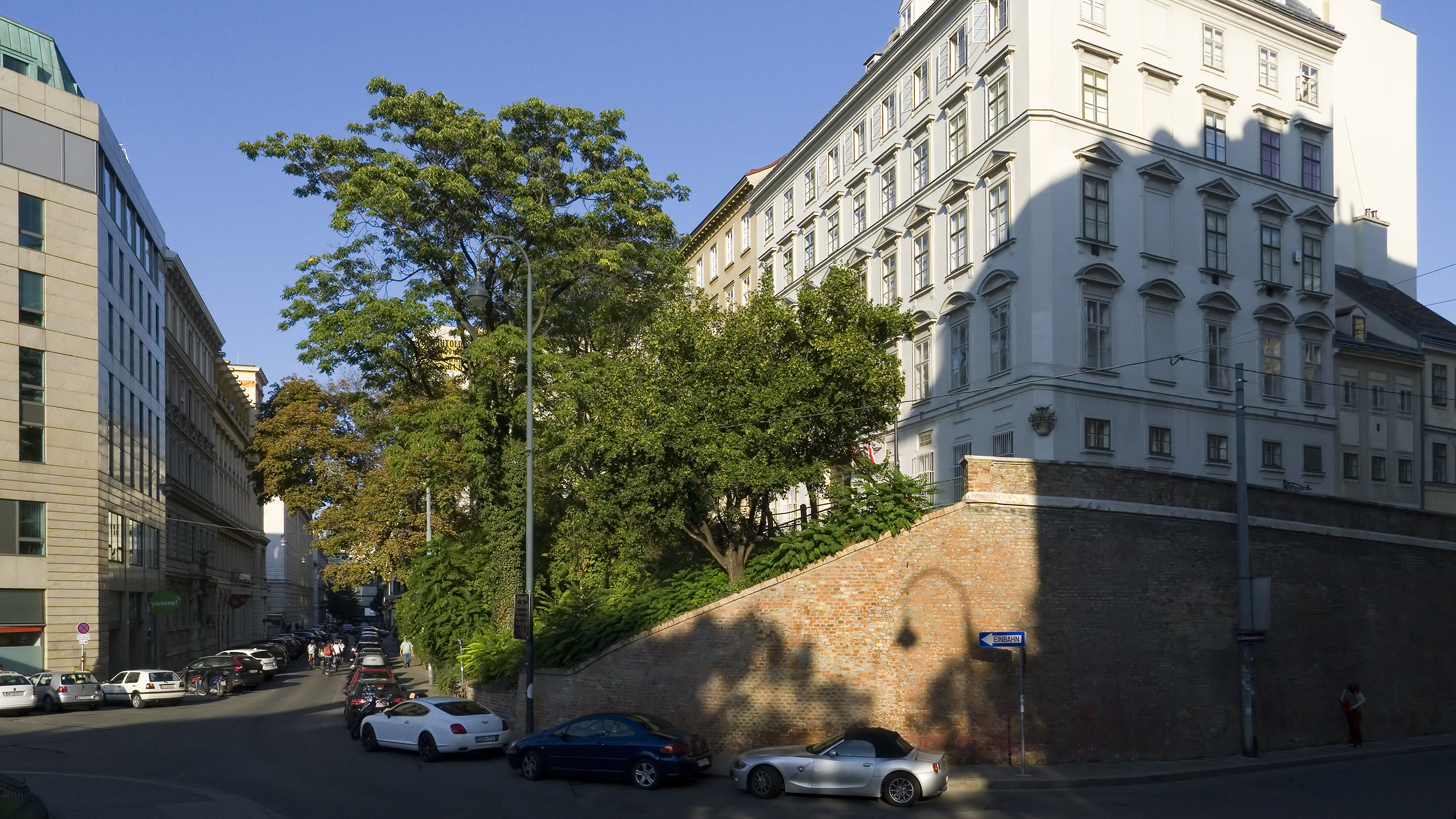 Mölker Bastei in Wien 1 bei der Kreuzung Schreyvogelgasse Richtung Nordosten